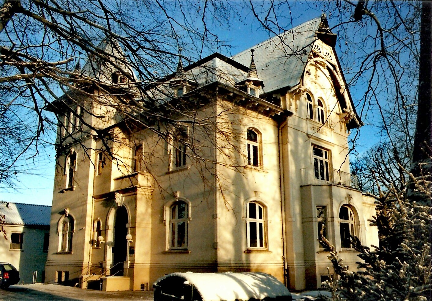 Wohnhaus Moritz Grünwellers in Lübeck